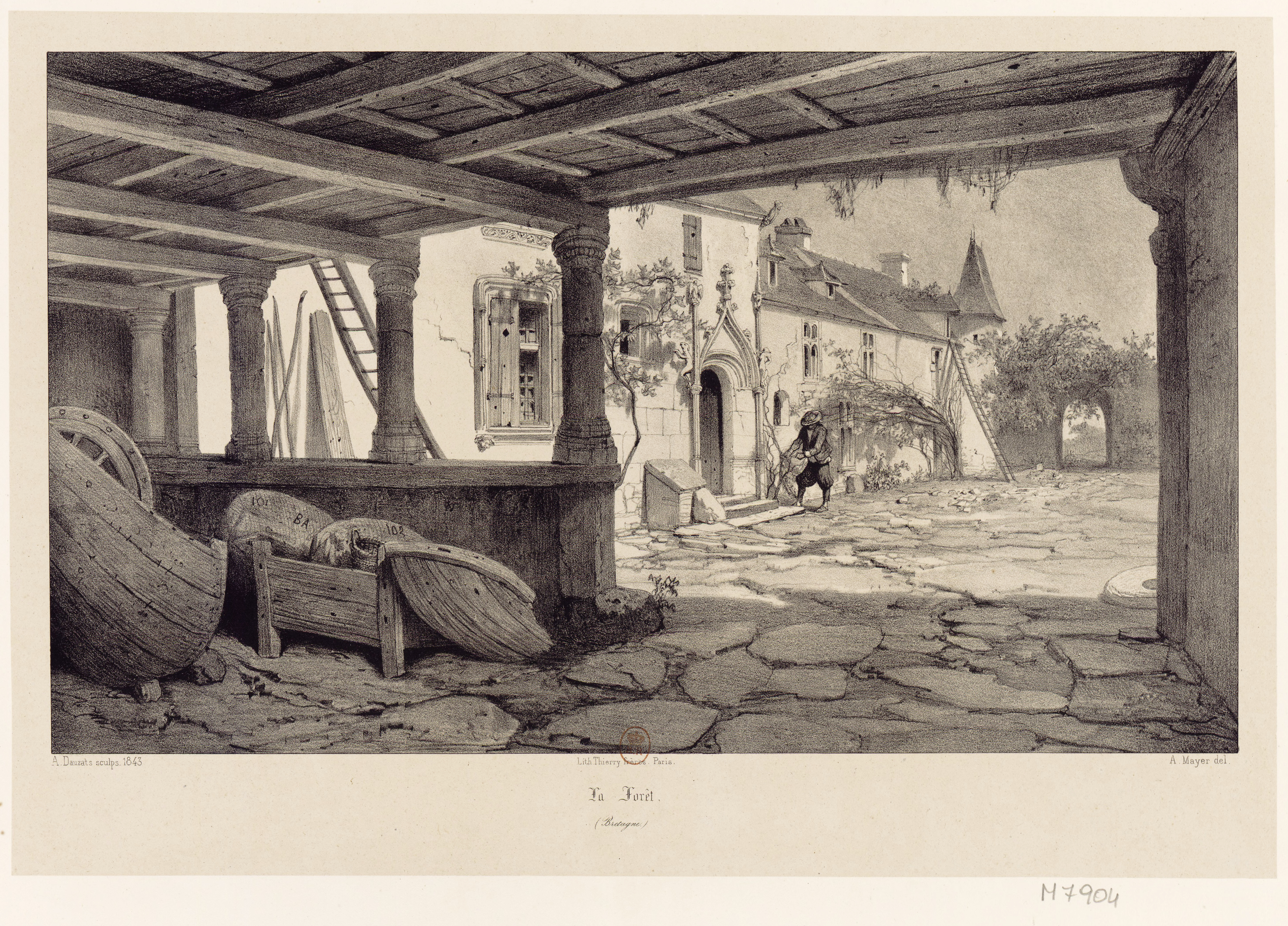 Dessin de 1843 et publié en 1846, par Adrien Dauzats et Auguste Mayer, de l'ancien manoir de la Forêt, à Kerfeunten (Quimper), détruit vers 1942.